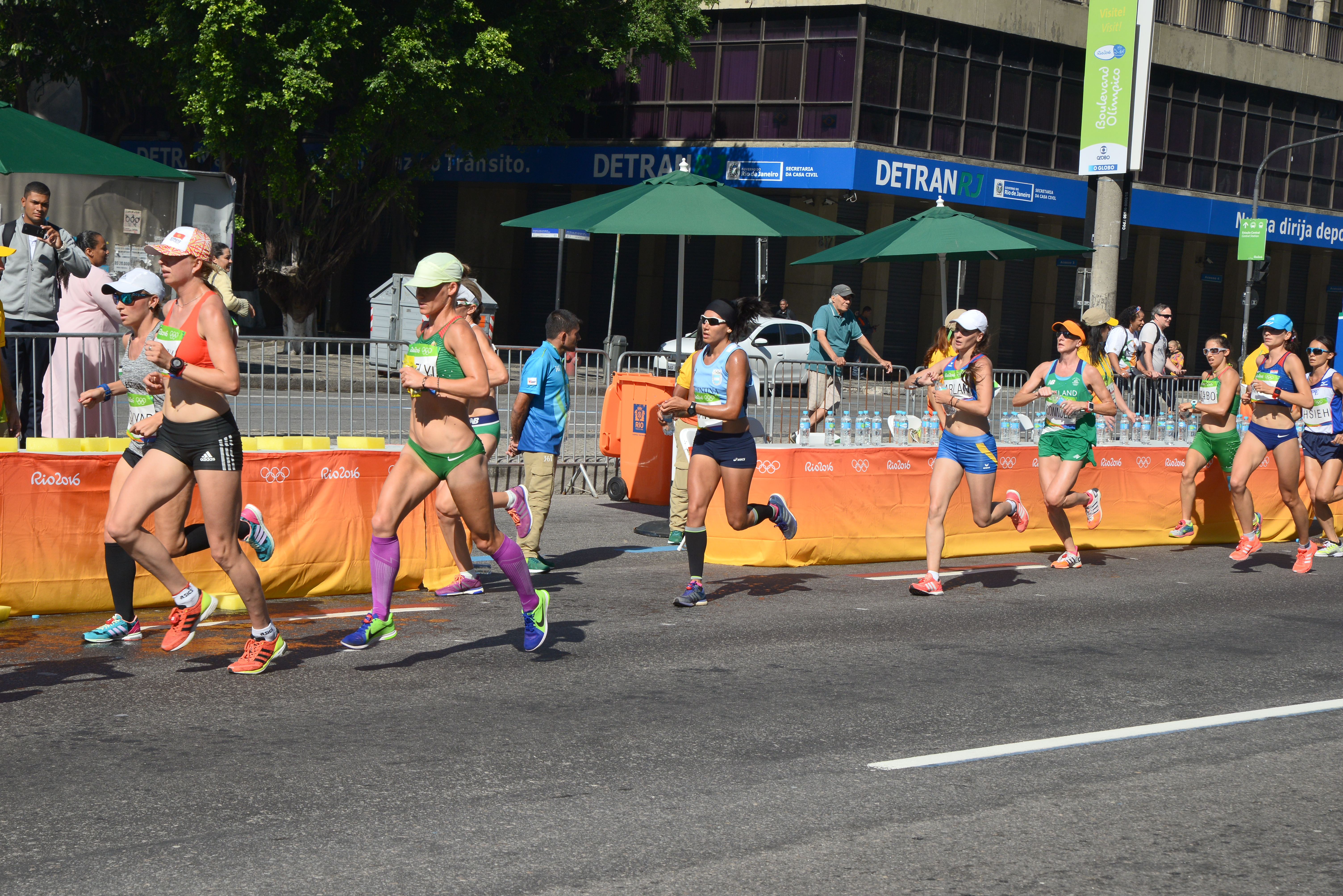 Passage du marathon des jeux olympiques de Rio 2016 dans le centre de Rio